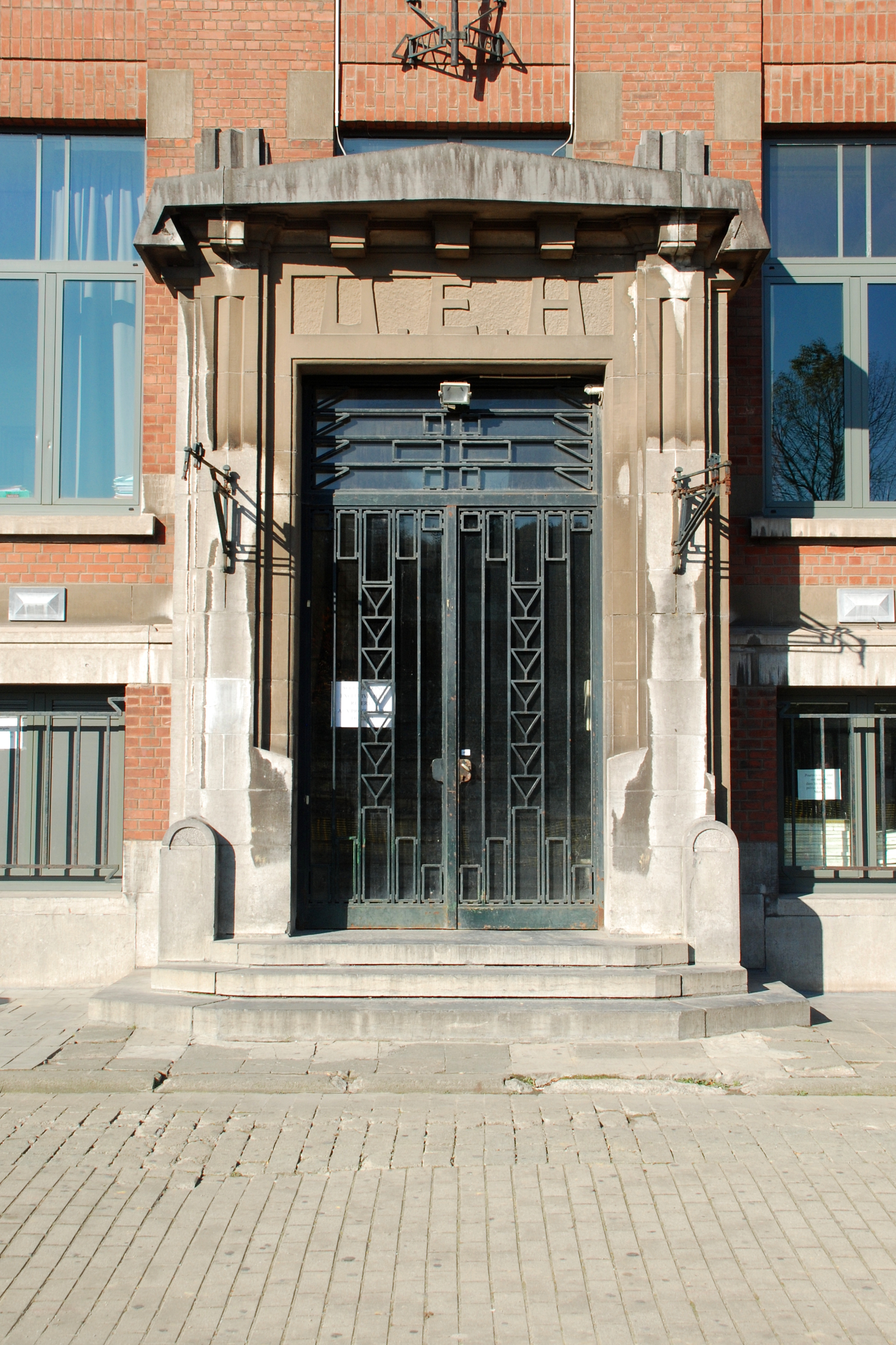 Belgique - Brabant wallon - Court-Saint-Étienne - Grands bureaux de l'usine Henricot n°2